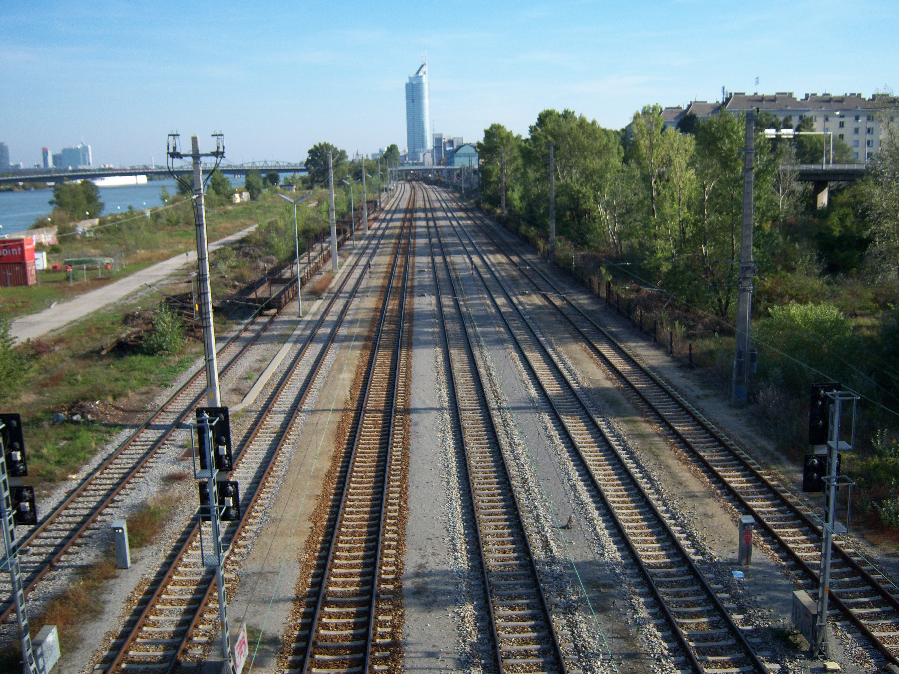 Bahnhof Wien Brigittenau, Donauuferbahn, gesehen 2008 vom Nordsteg (seit 2009: Steinitzsteg)